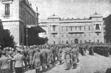 97. pehotni polk se poslavlja od Trsta